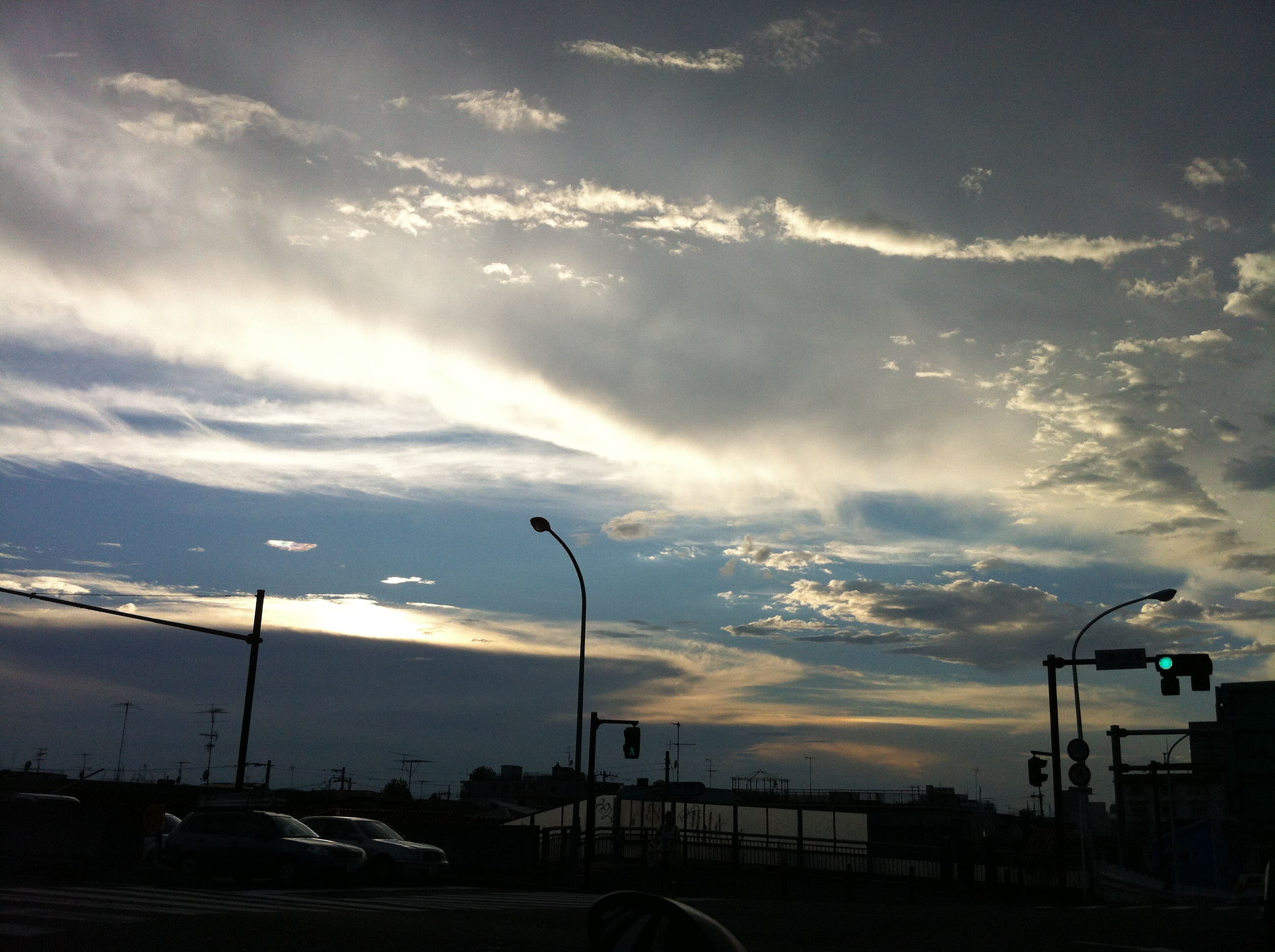 Noboritoshinmachi, Tama Ward, Kawasaki, Kanagawa Prefecture 214-0013, Japan